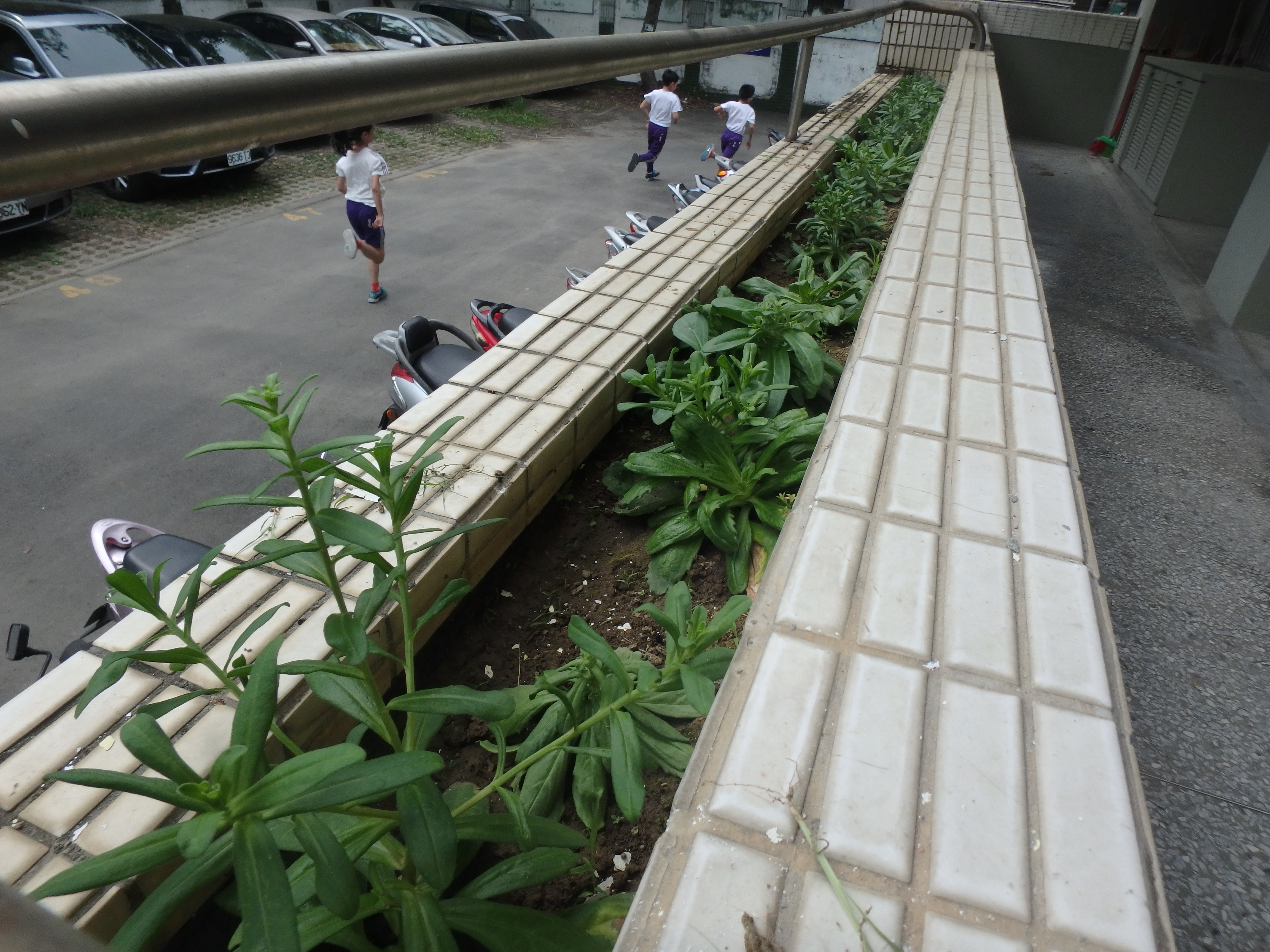 狗娃花